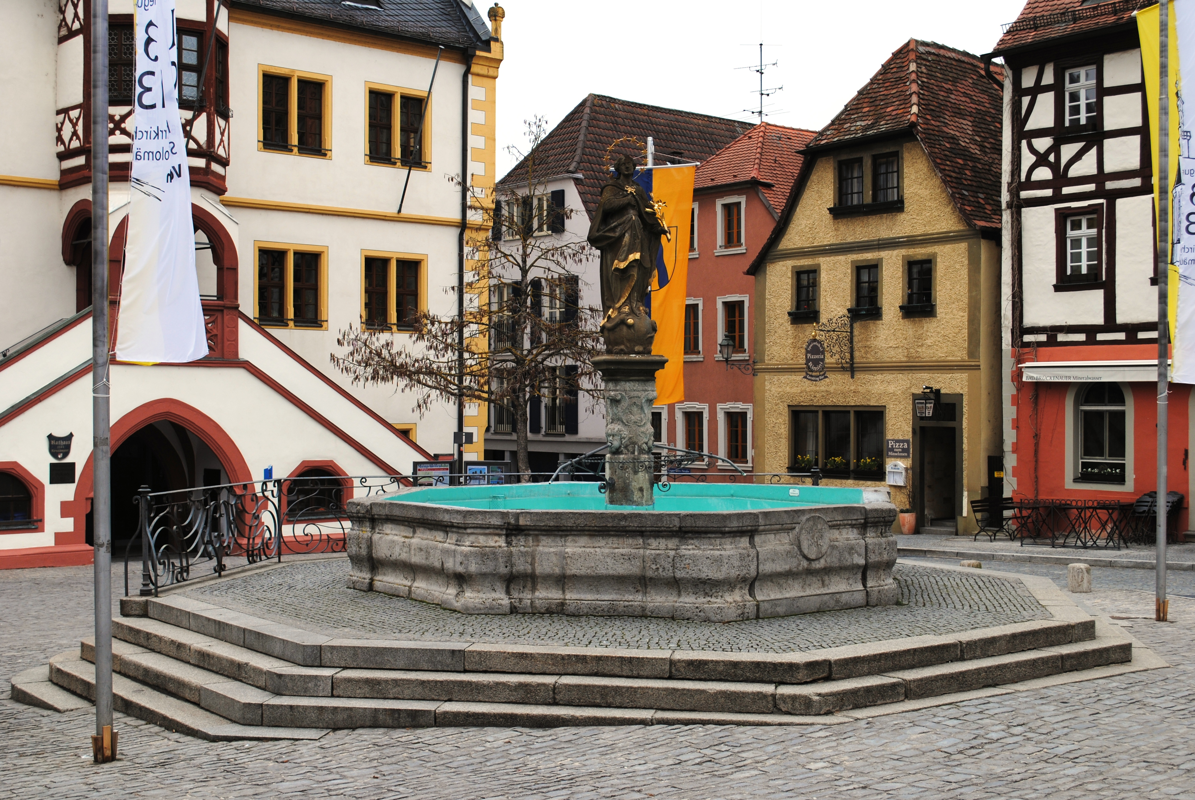 Marktbrunnen, Volkach, erste Vorläuferbrunnenanlage von Meister Philipp Höhenstein aus Schweinfurt bereits nach 1488, heutiger Stadtbrunnen als achteckiges Becken mit verkröpftem Brunnenkranz, in der Mitte vierröhrige Brunnensäule, darauf Immaculatastatue, die Brunnenanlage um 1720, bez. renoviert 1892